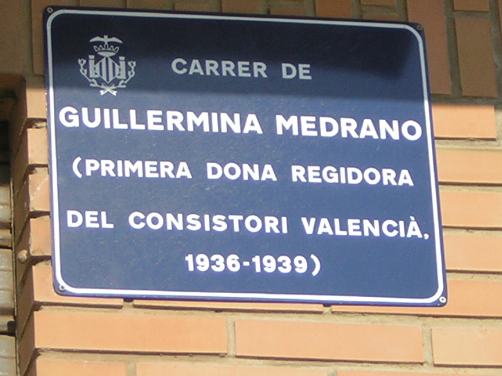 Placa de la calle Guillermina Medrano, en Borbotó, término municipal de Valencia. Placa dela carrer Guillermina Medrano, en Borbotó, terme municipal de València.